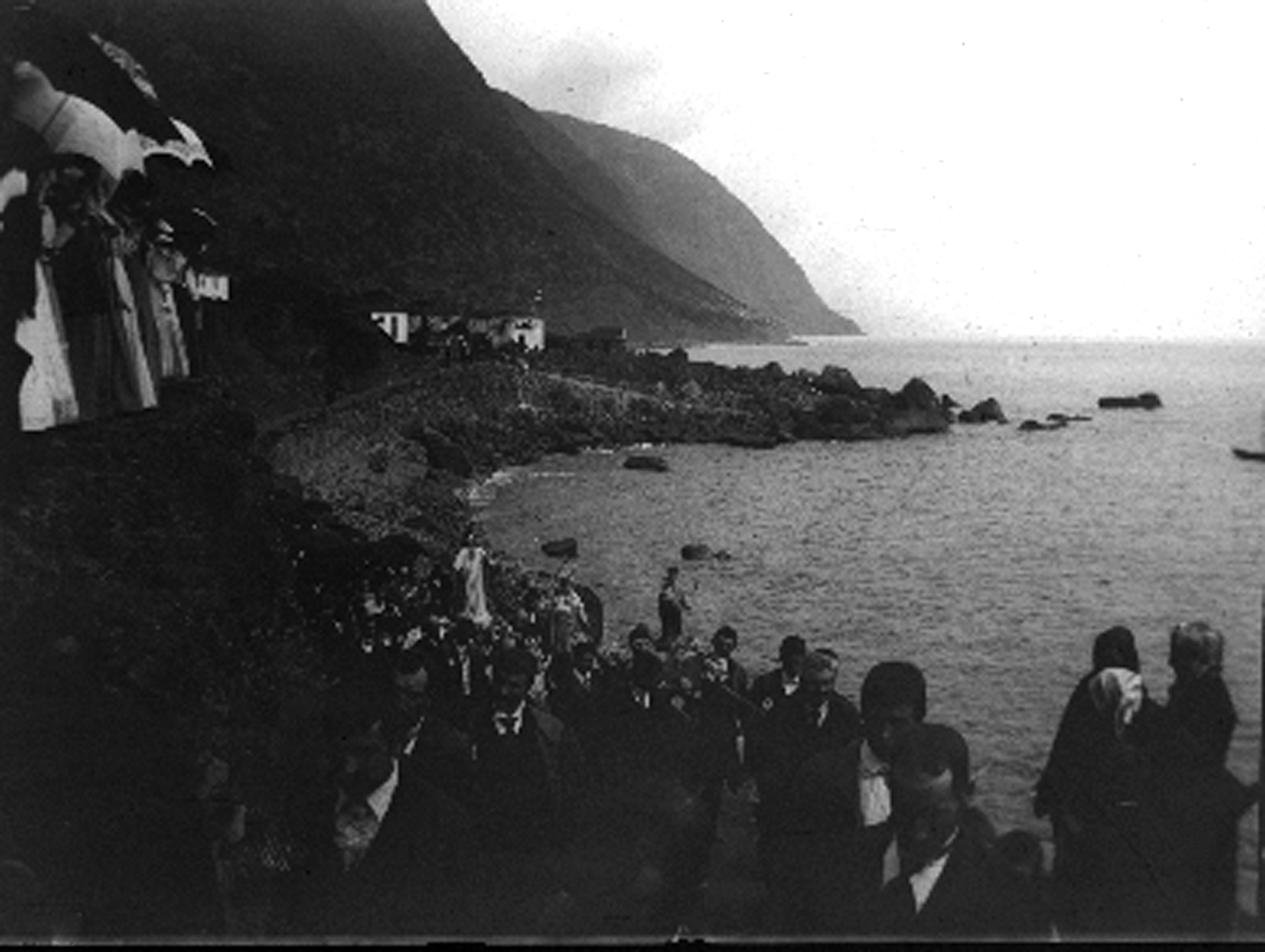 Cais da Fajã de São João, ilha de São Jorge, Arquivo de Villa Maria, ilha Terceira, Açores